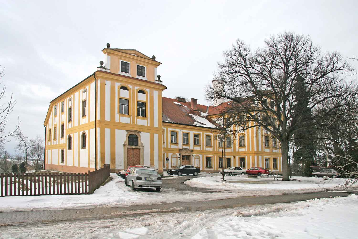 Zámek v obci Dolní Přím